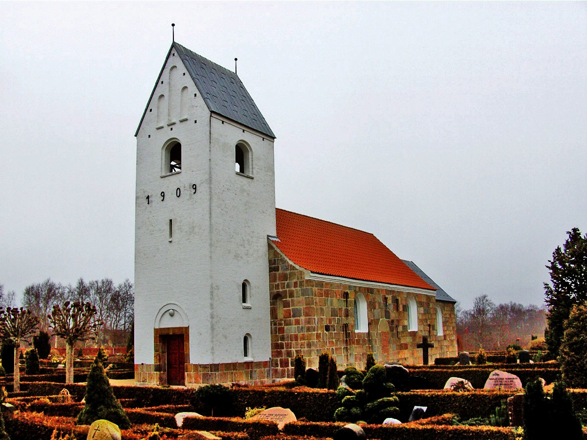 fra sydvest